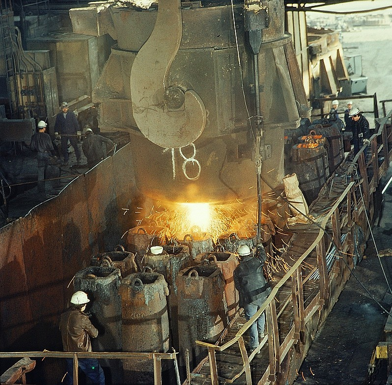 Original image description from the Deutsche FotothekMetallurge für Hüttentechnik